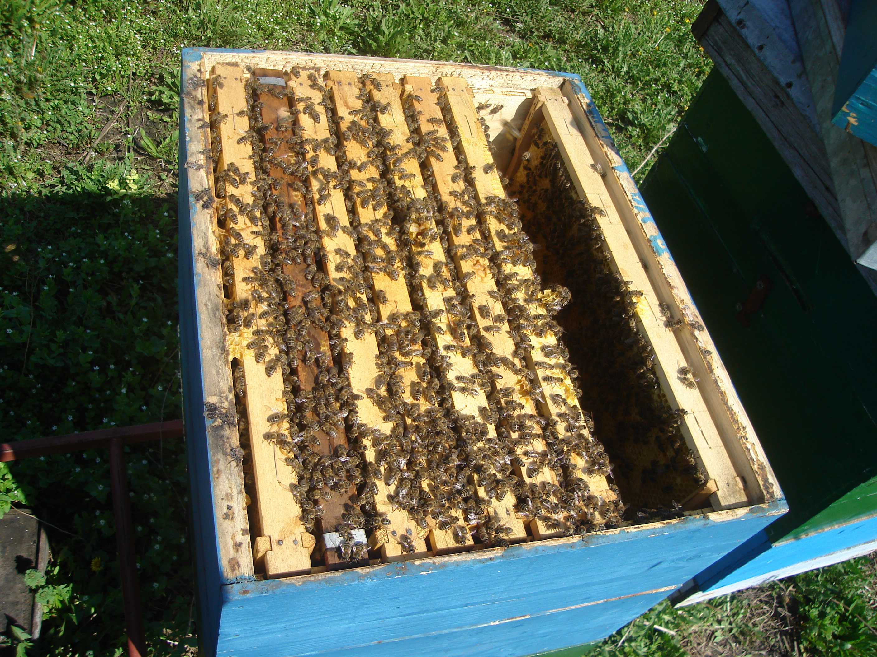 Вишекорпусна кошница широкониских оквира